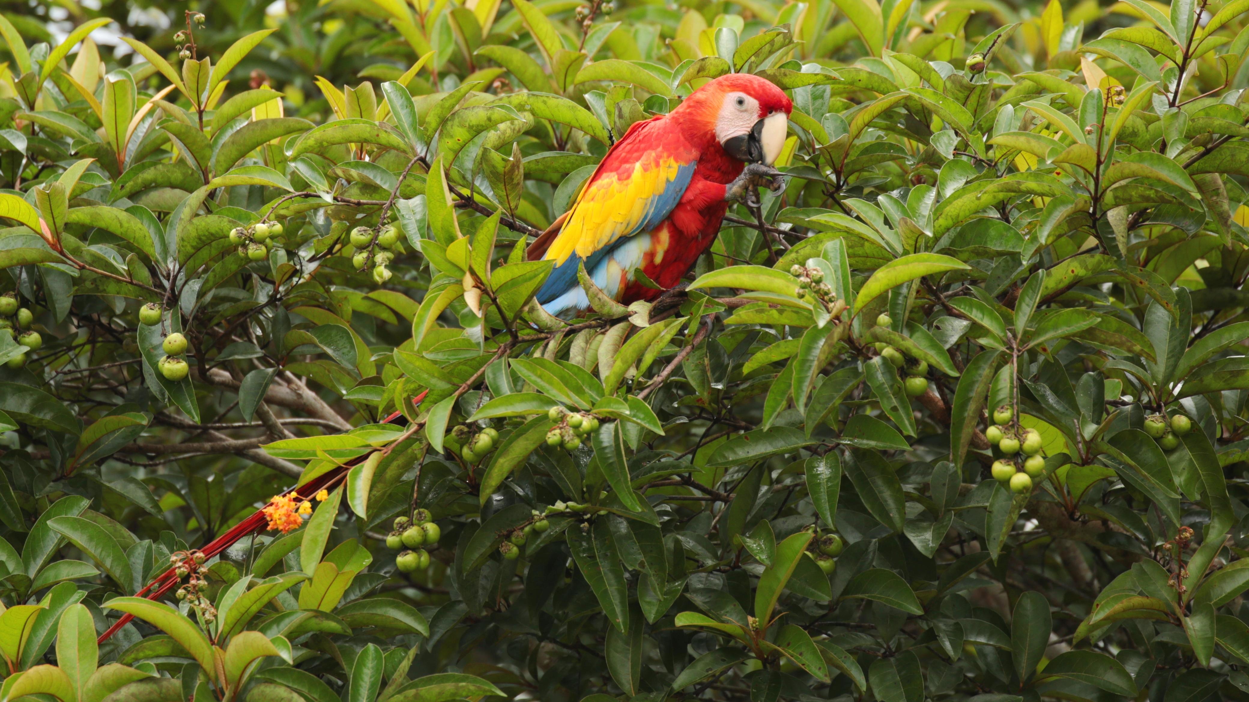 Guacamaya roja